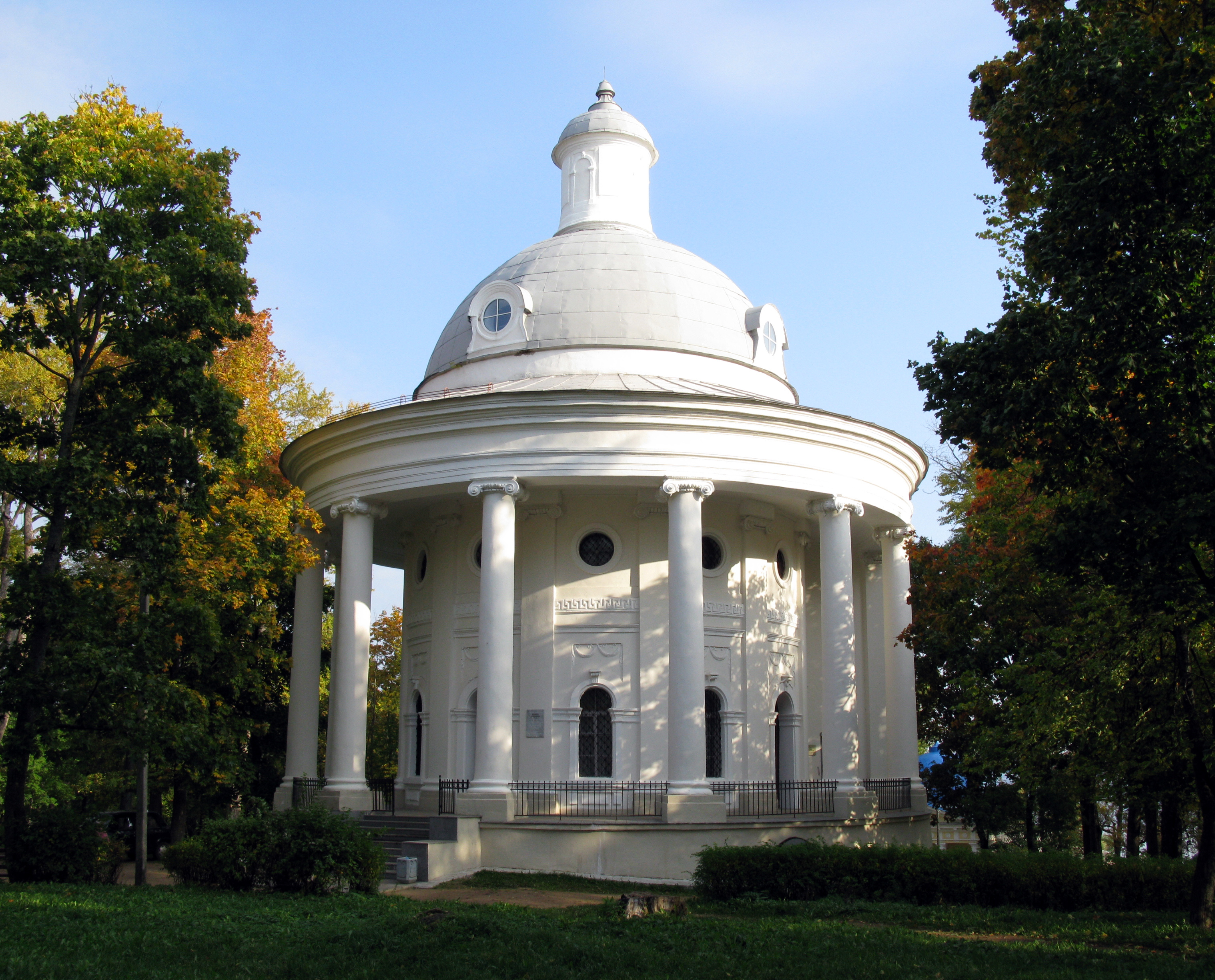 Храм Великомученицы Екатерины (Новгородская область, г. Валдай).